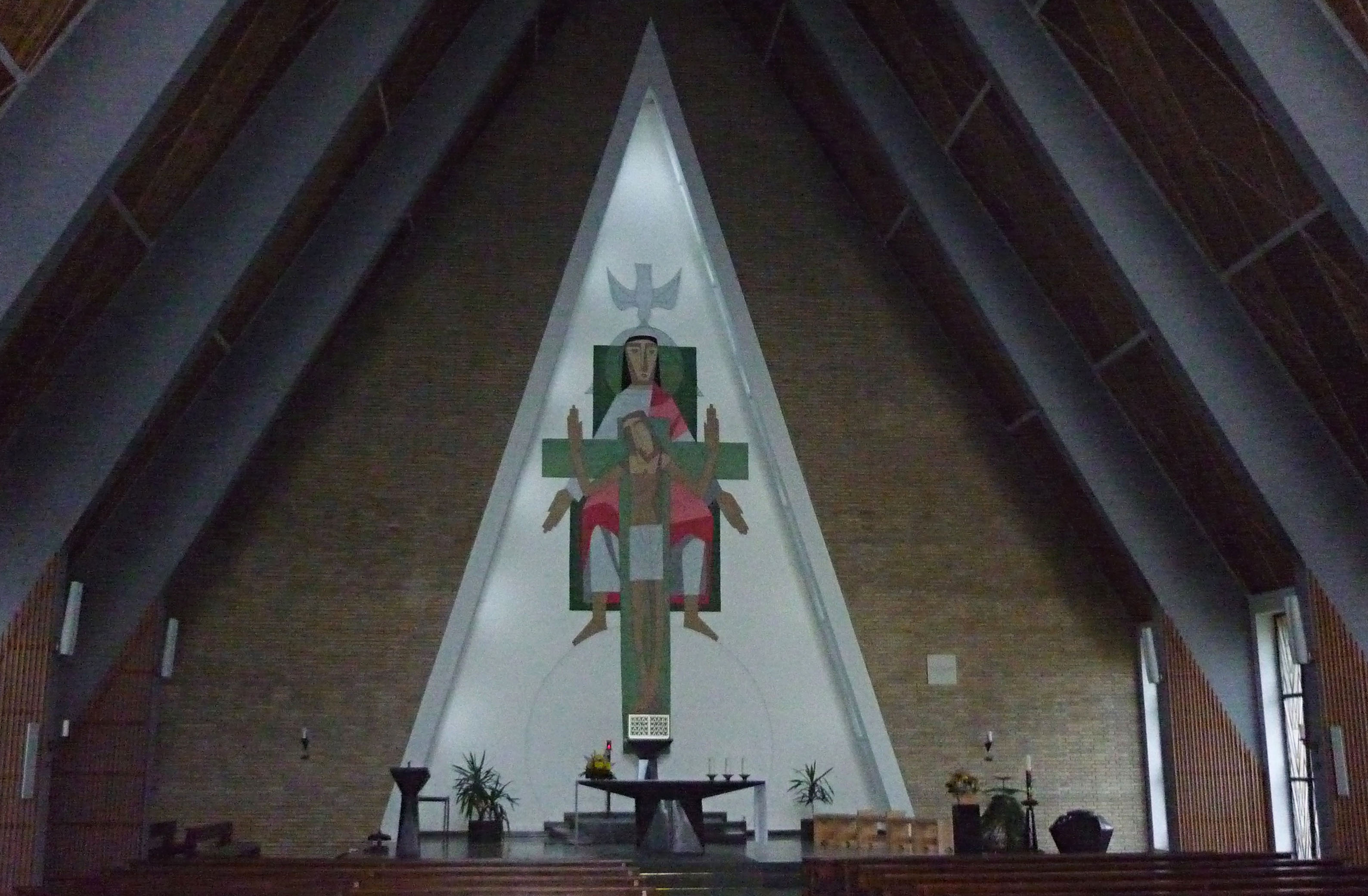 Kirchenraum der kath. Pfarrkirche St. Benno in Bad Lauterberg